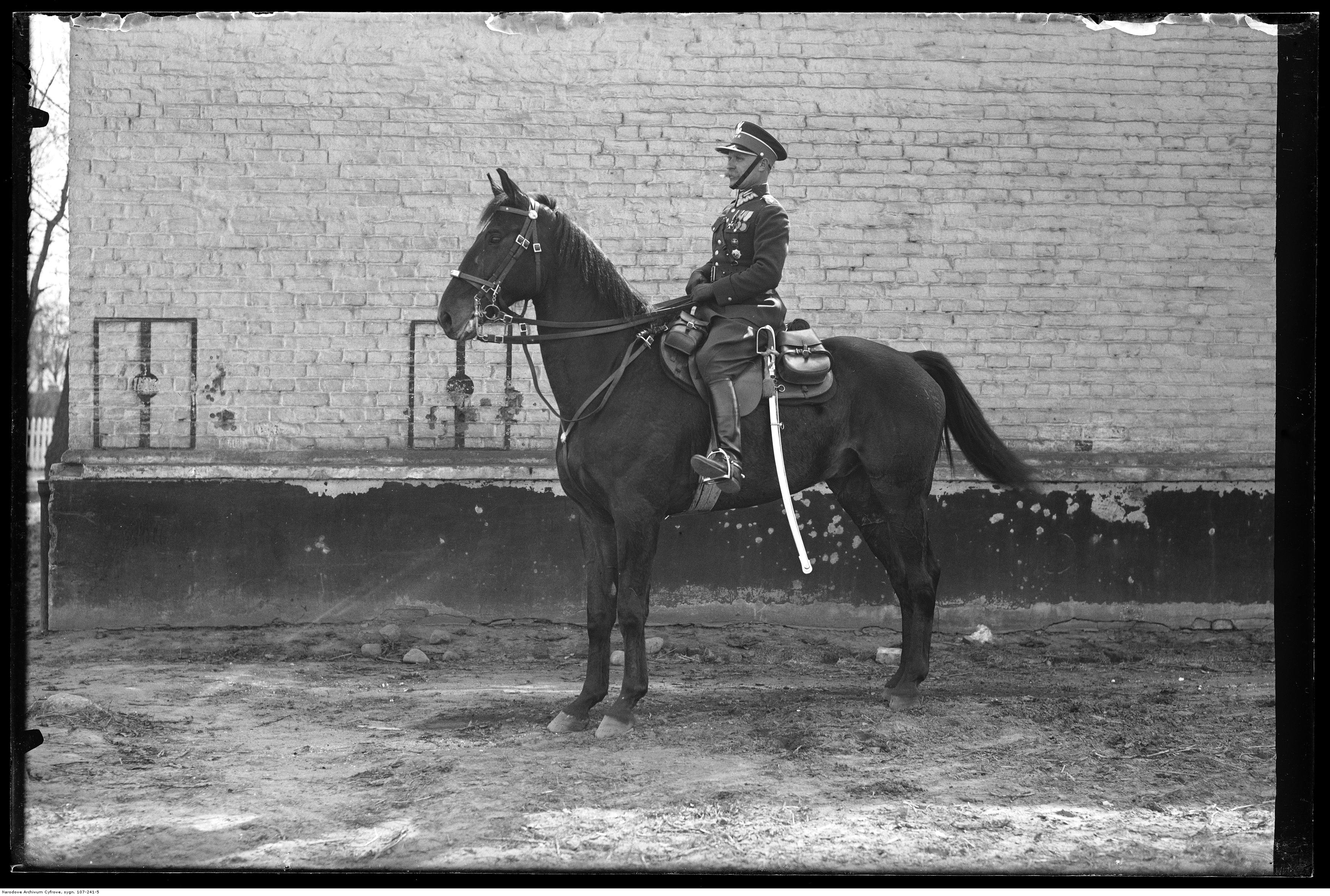 Rtm. Mieczysław Badowski na koniu.